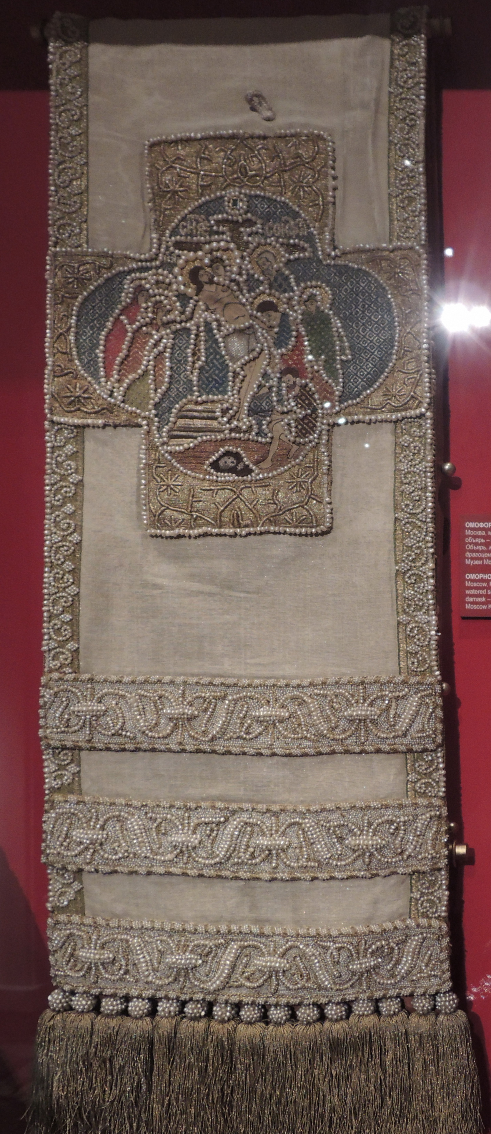 Омофор патриарха Иова. Москва, мастерские Кремля, 16-17 вв; объярь - Италия, 17 в.; камка - Китай, 17 в. Объярь, камка, золотные и шелковые нити, драгоценные камни, жемчуг, шитье